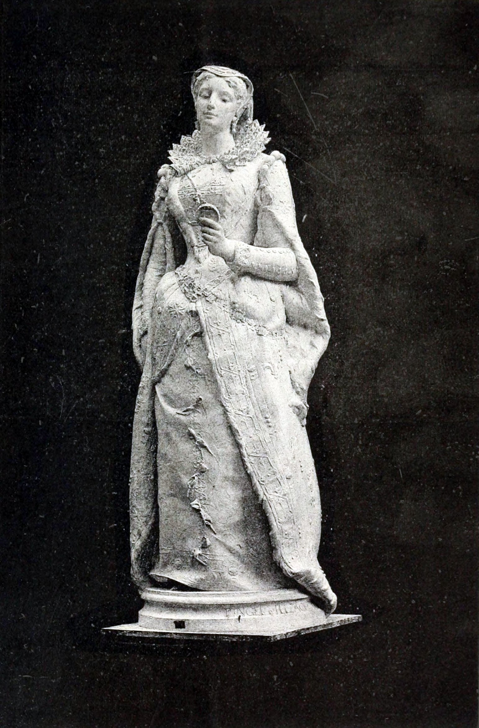 Marie Stuart, plâtre